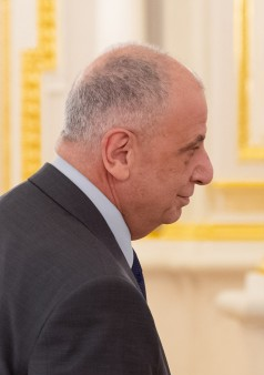 ウクライナ駐箚ジョージア大使のテイムラズ・シャラシェニゼ。ウクライナ大統領に信任状を奉呈。